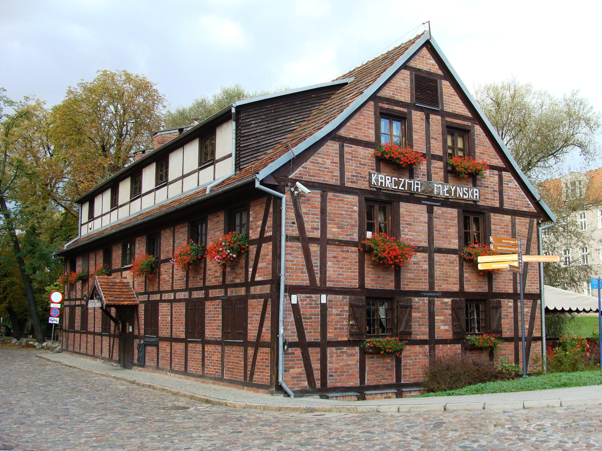 Bydgoszcz, spichrz, 1835 (na Wyspie Młyńskiej)